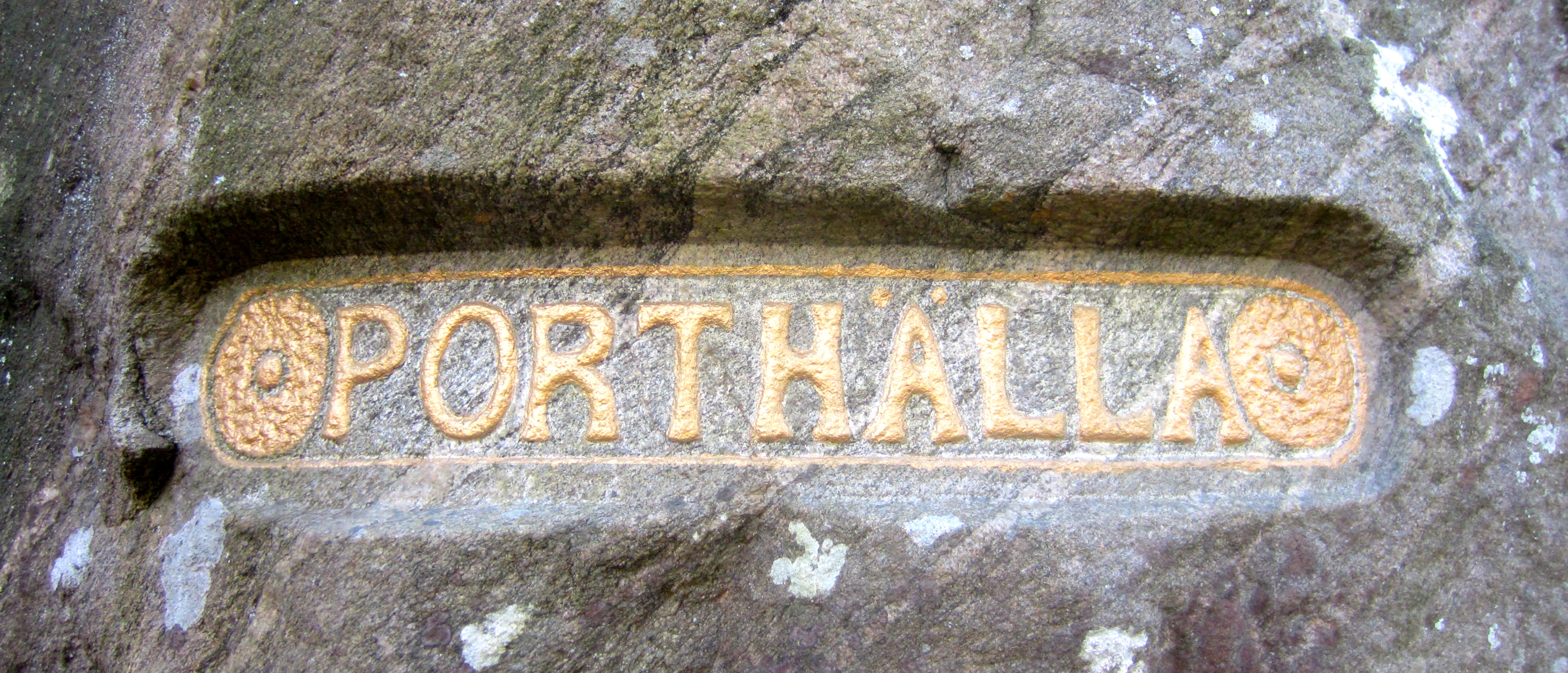 Inskription i berget vid Villa Porthälla i Partille kommun. Villan byggdes 1914-18 för direktör Ernst Harbeck och hans familj. Den är ritad av arkitekt Hjalmar Zetterström.